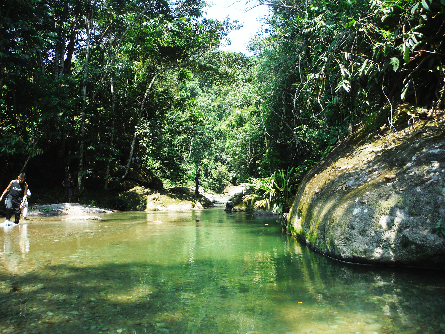 Paisaje en la ruta a la catarata Cotomono